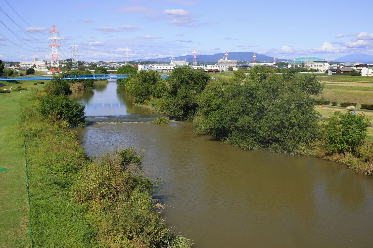 境川（愛知県道56号境川橋上より、2019年（令和元年）10月）